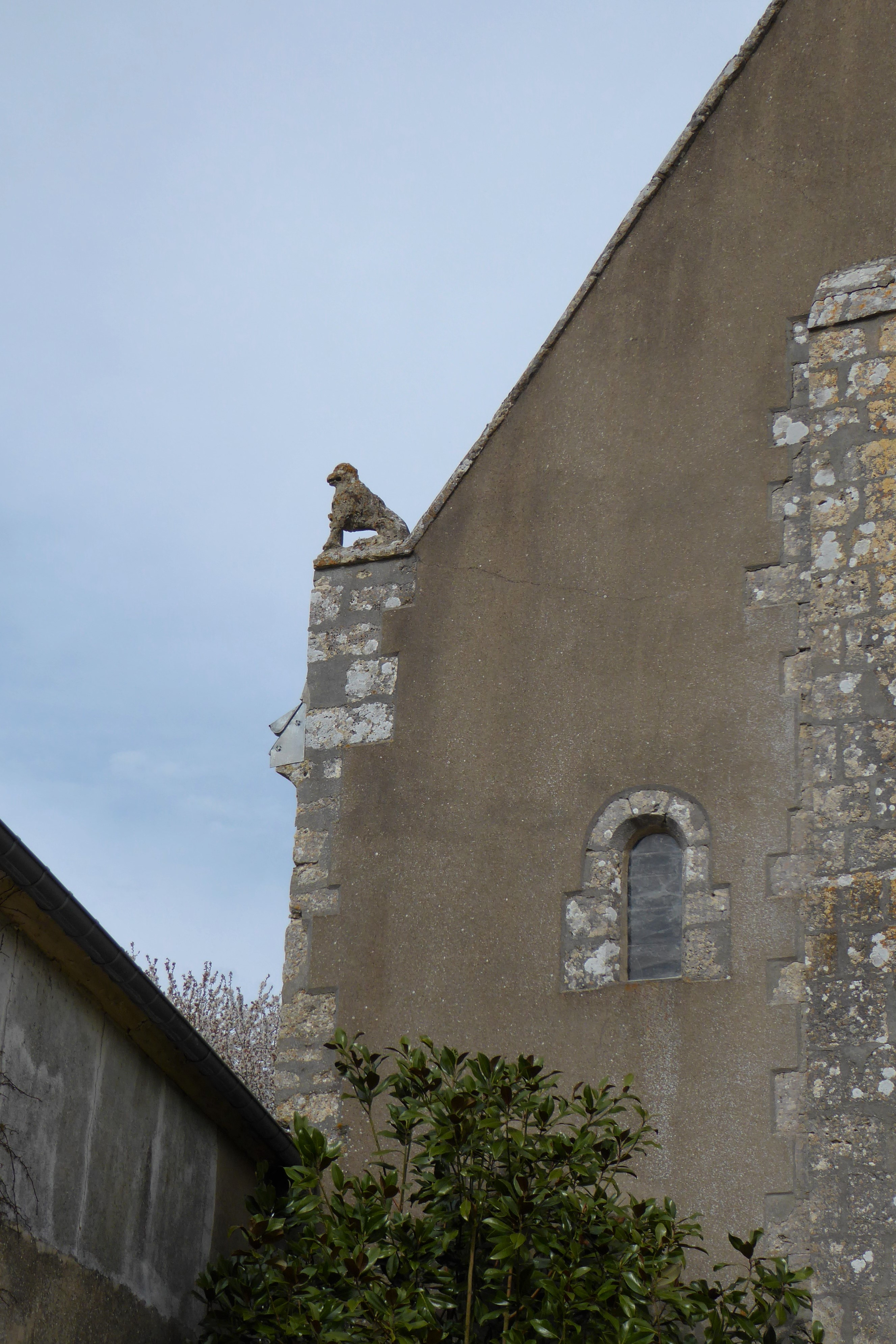 détail de la façade ouest de l'église Saint-Martin-et-Saint-Jouvin, Sandarville, Eure-et-Loir, France.